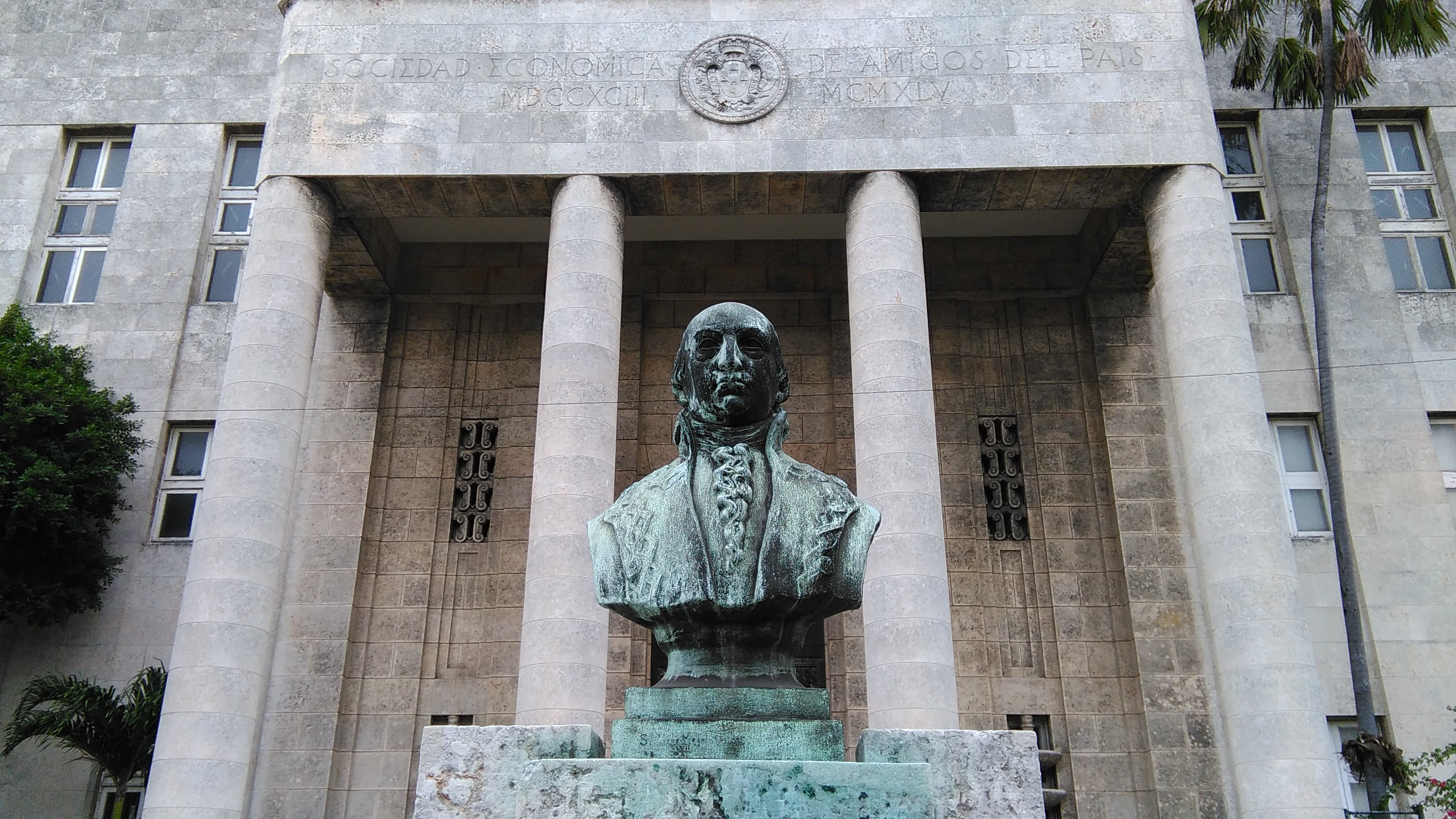 Fachada de la Sociedad económica de amigos del país en La Habana fundada en 1792.